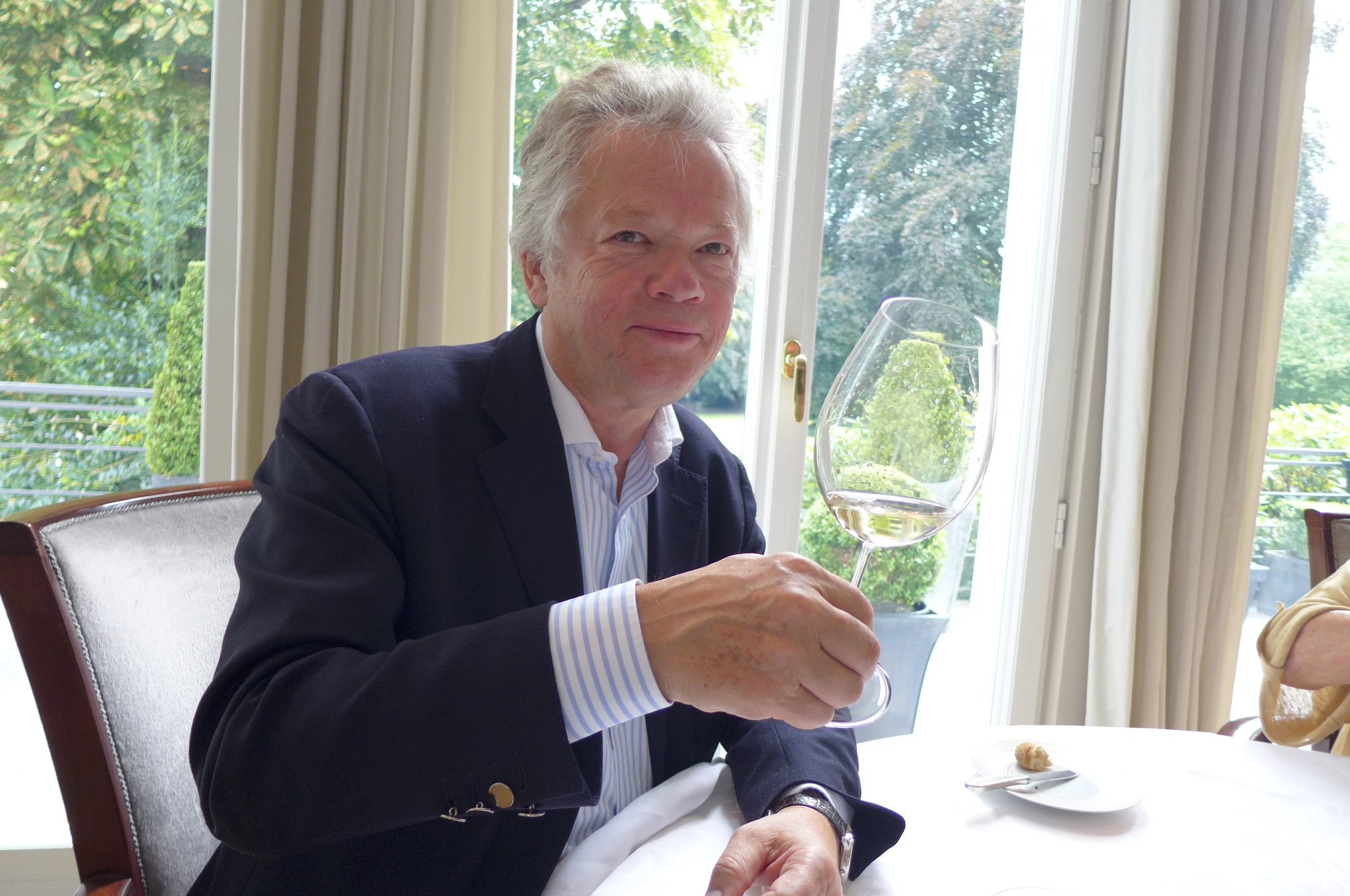 Gilles Pudlowski - Journaliste Français